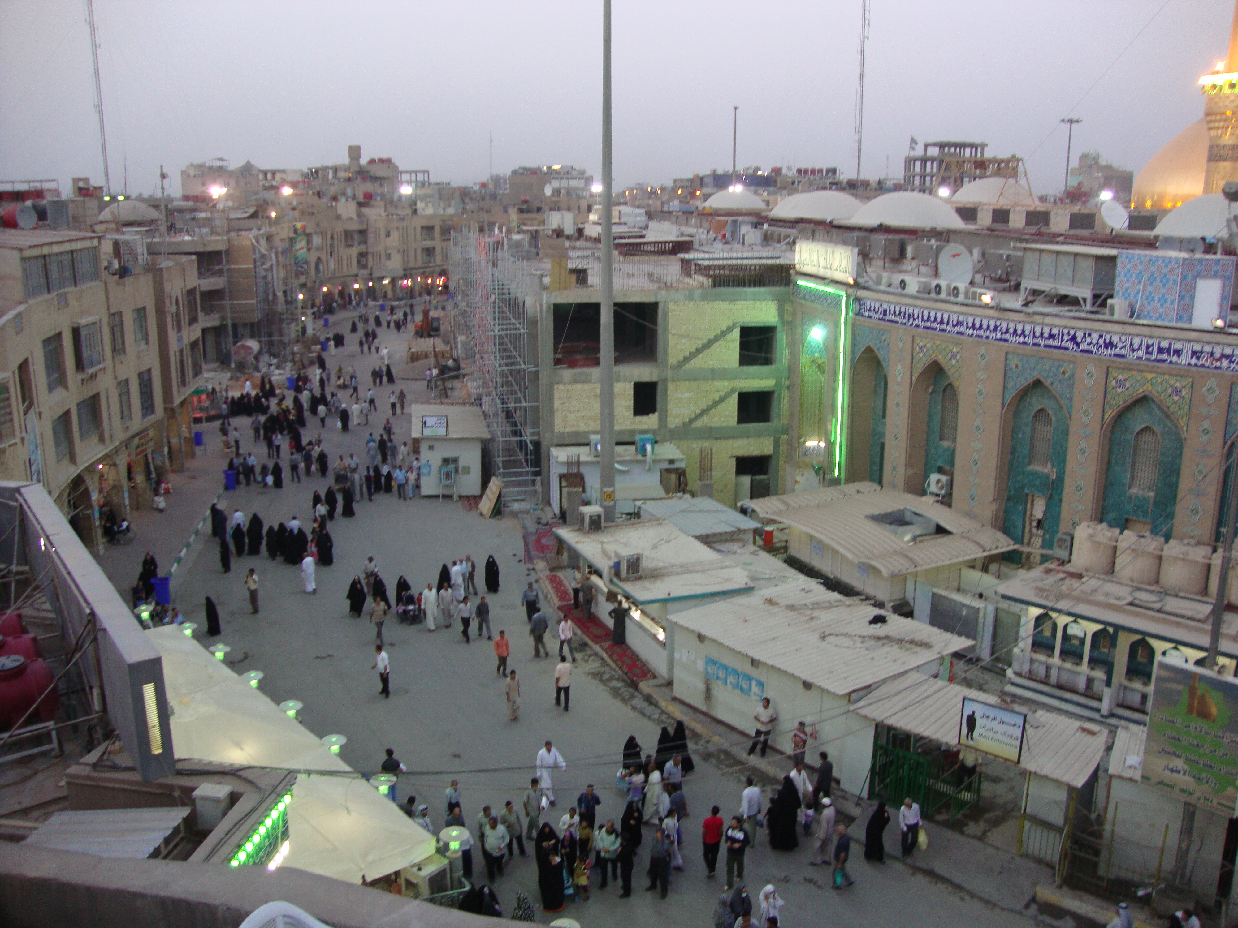 كربلا - مهر 89